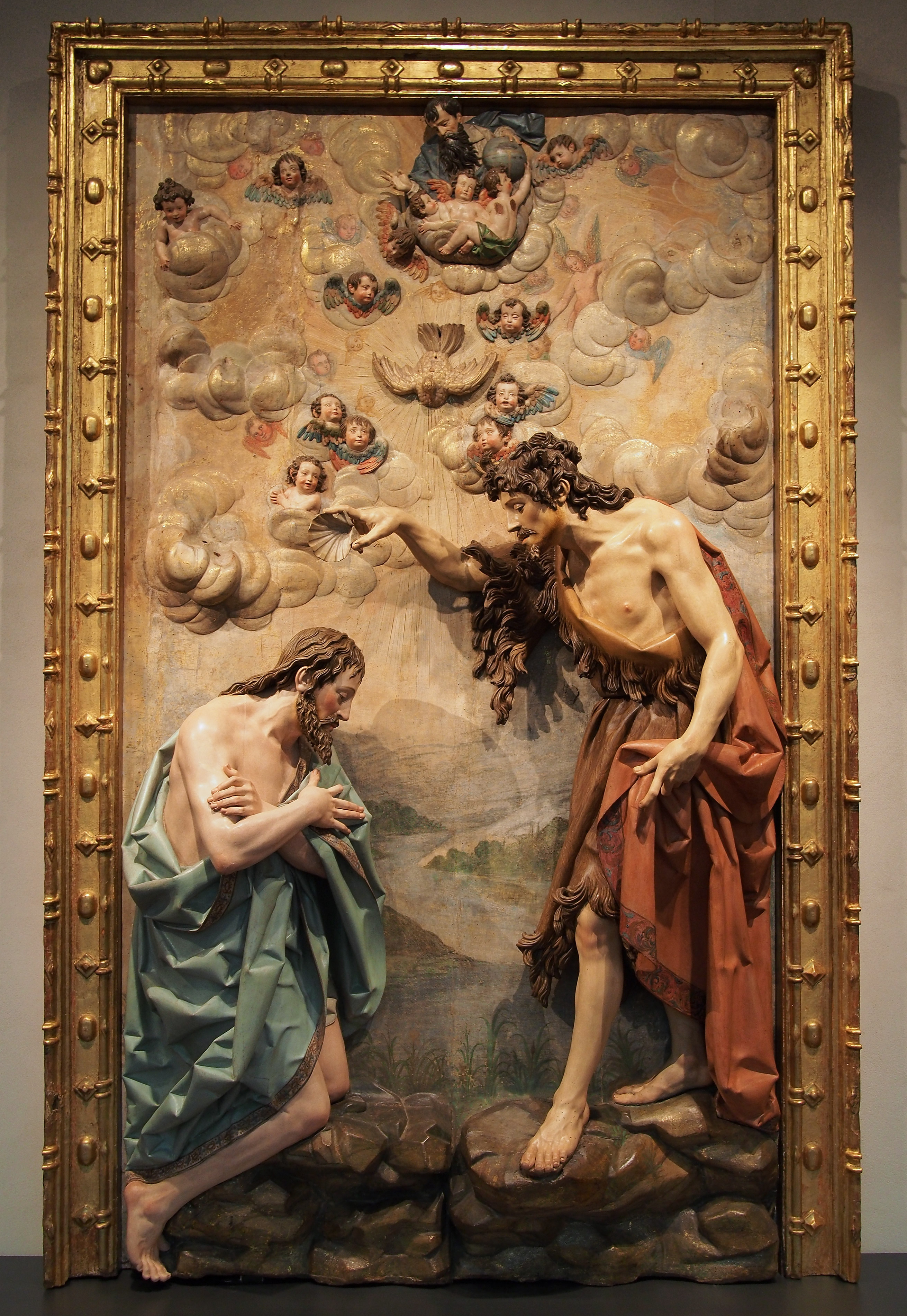 Bautismo de Cristo, madera policromada, c.1630; escultura de Gregorio Fernández (1576-1636), policromía atribuida a Diego Valentín Díaz. Museo Nacional de Escultura, Valladolid.